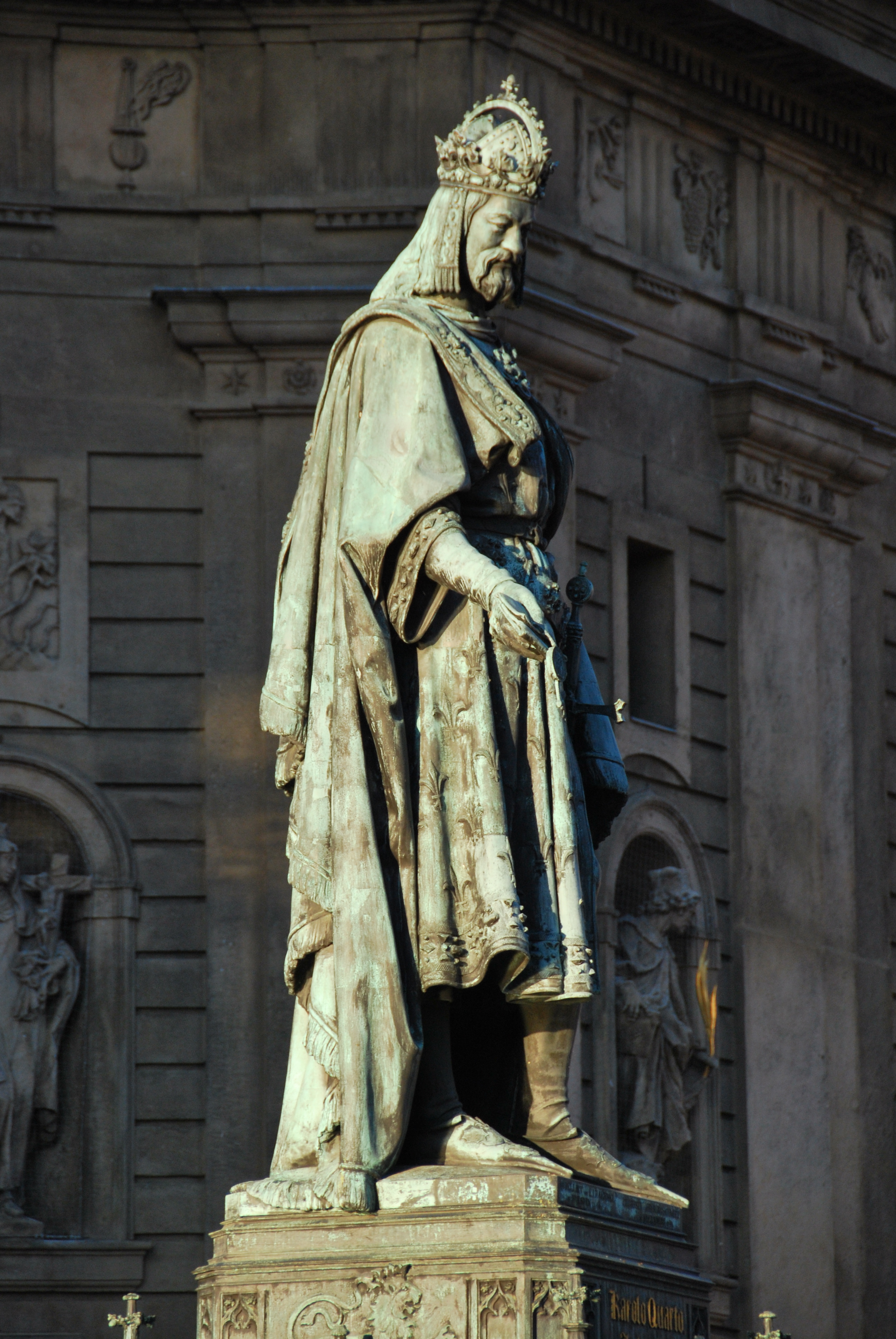 Praga - Ponte Karl - Statua di Karl IV